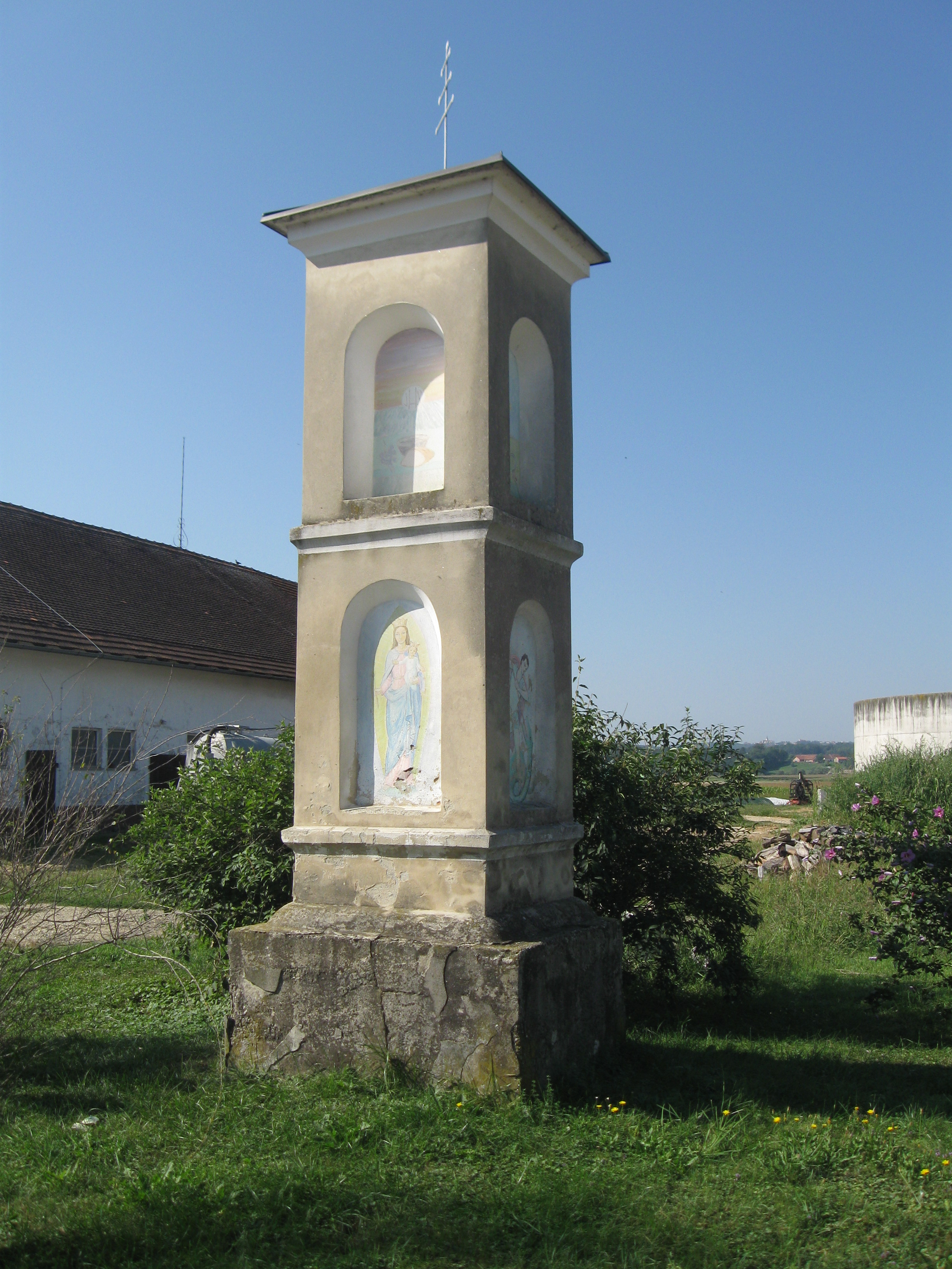 Baročno slopno znamenje iz 18. stoletja ima ob straneh niše. Venec deli znamenje v dva dela. Pokriva ga piramidasta streha.